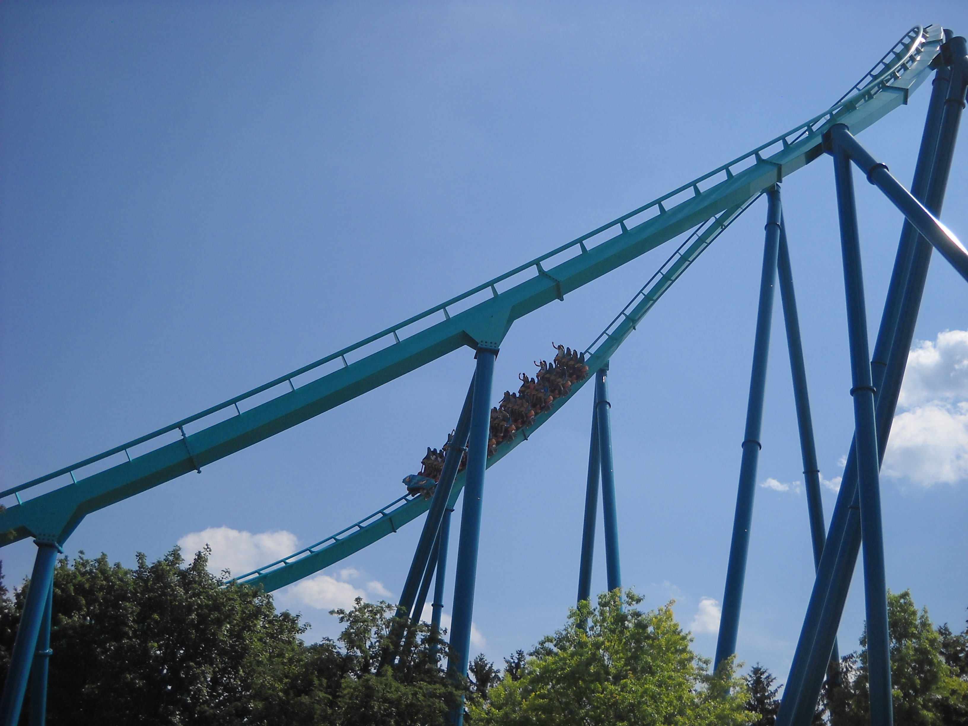 Um pedacinho do monstro...